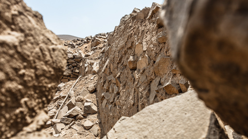 Muro y pasaje